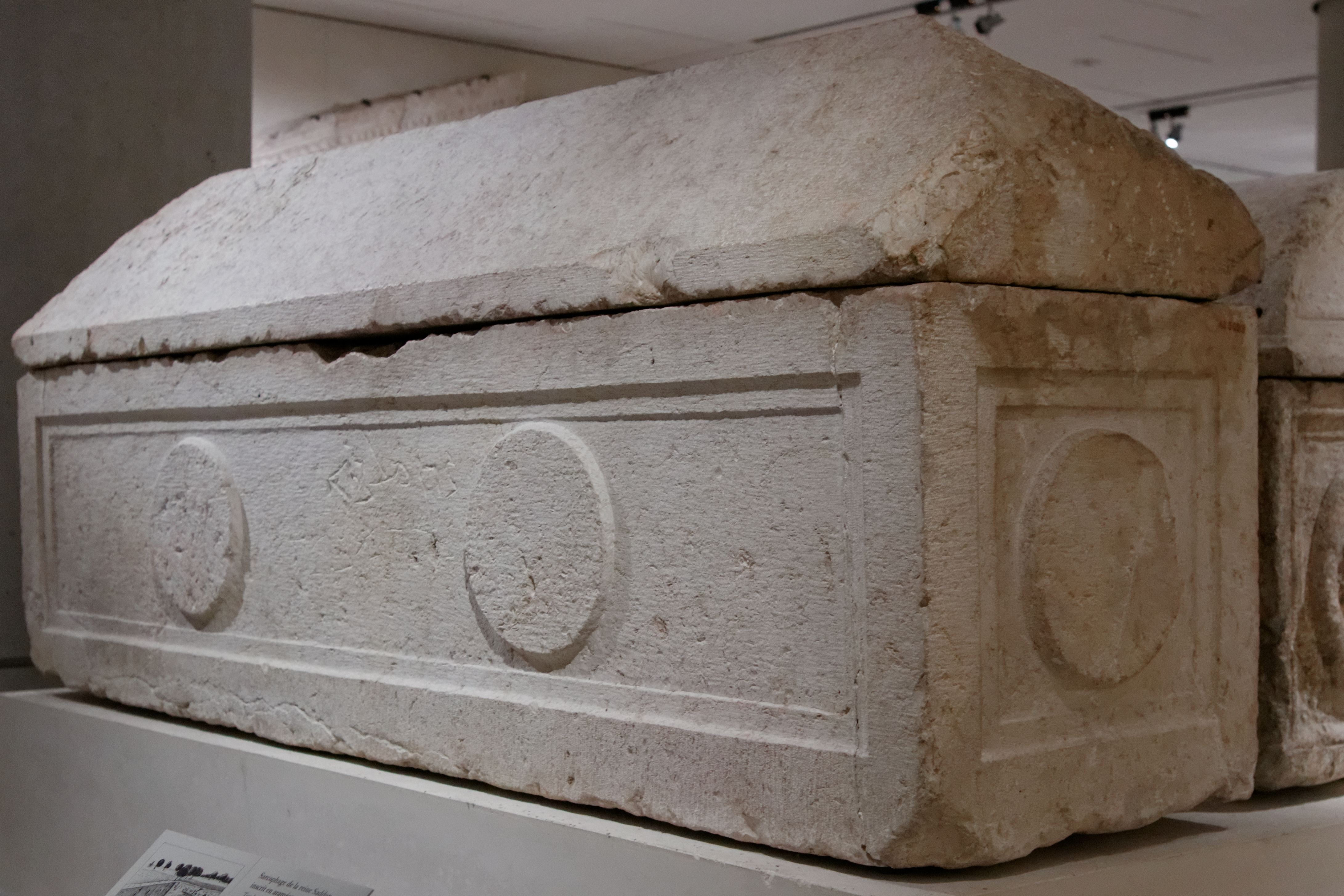 Ce sarcophage a été découvert dans le tombeau, dans une chambre souterraine inviolée dont l’accès avait été condamné par une porte en pierre (AO 5056). Installé dans une niche voûtée, le sarcophage à couvercle en double pente ne portait d’autre décor qu’une double inscription, gravée à la hâte, mentionnant en hébreu et en araméen « la reine Saddan ». Celle-ci, que Saulcy avait d’abord identifiée à une princesse de la lignée de David, est la reine connue sous le nom d’Hélène, reine d’Adiabène.